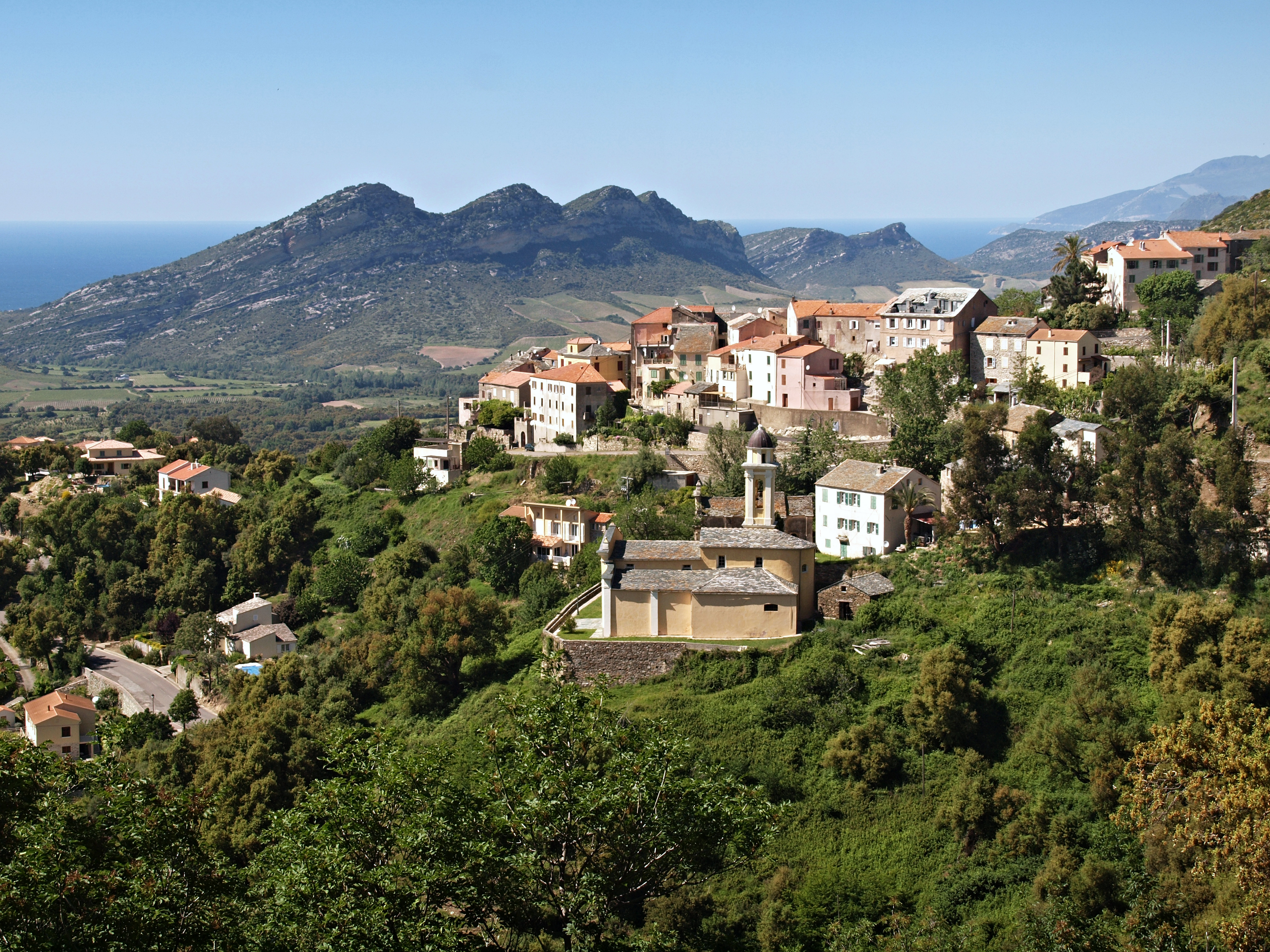 Poggio-d'Oletta, Nebbio (Corse) - Vue du village et de son église San Cervone